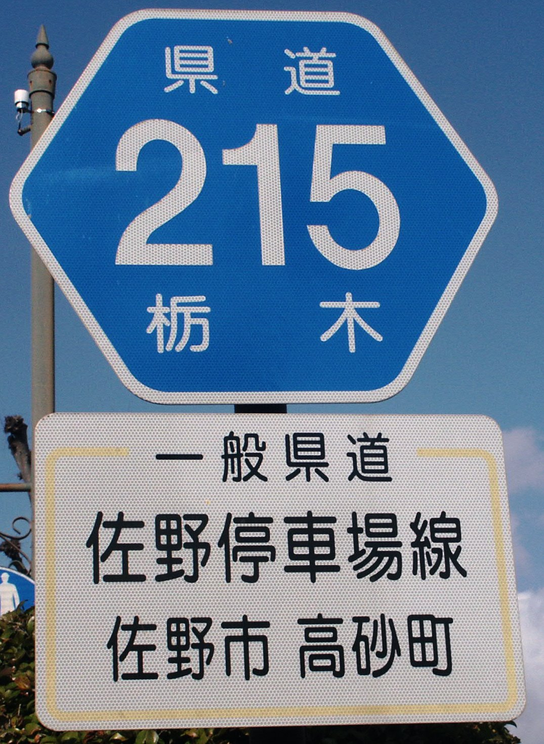 栃木県道215号線の路線番号標識